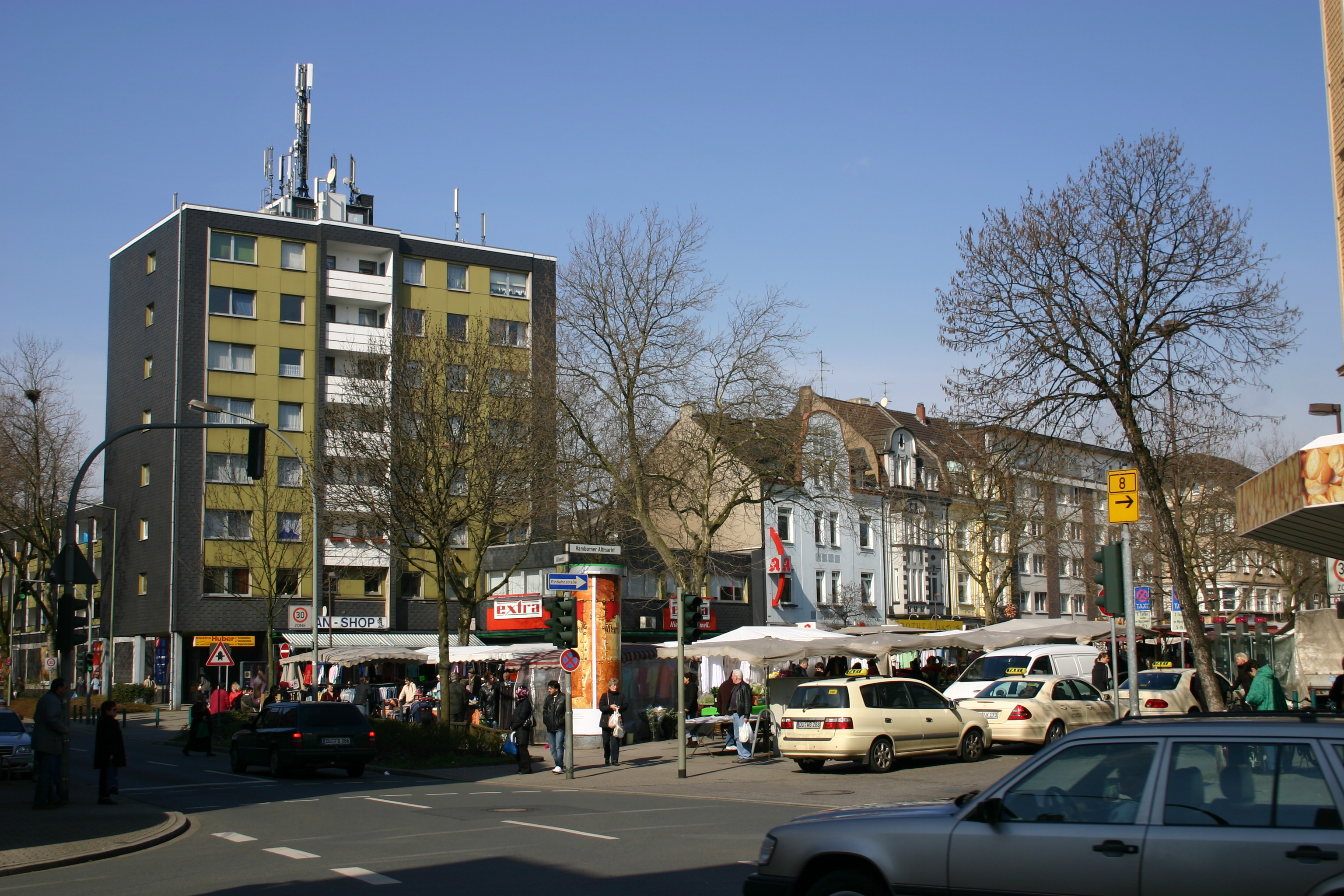 Altmarkt in Duisburg-Hamborn / Nordrhein-Westfalen